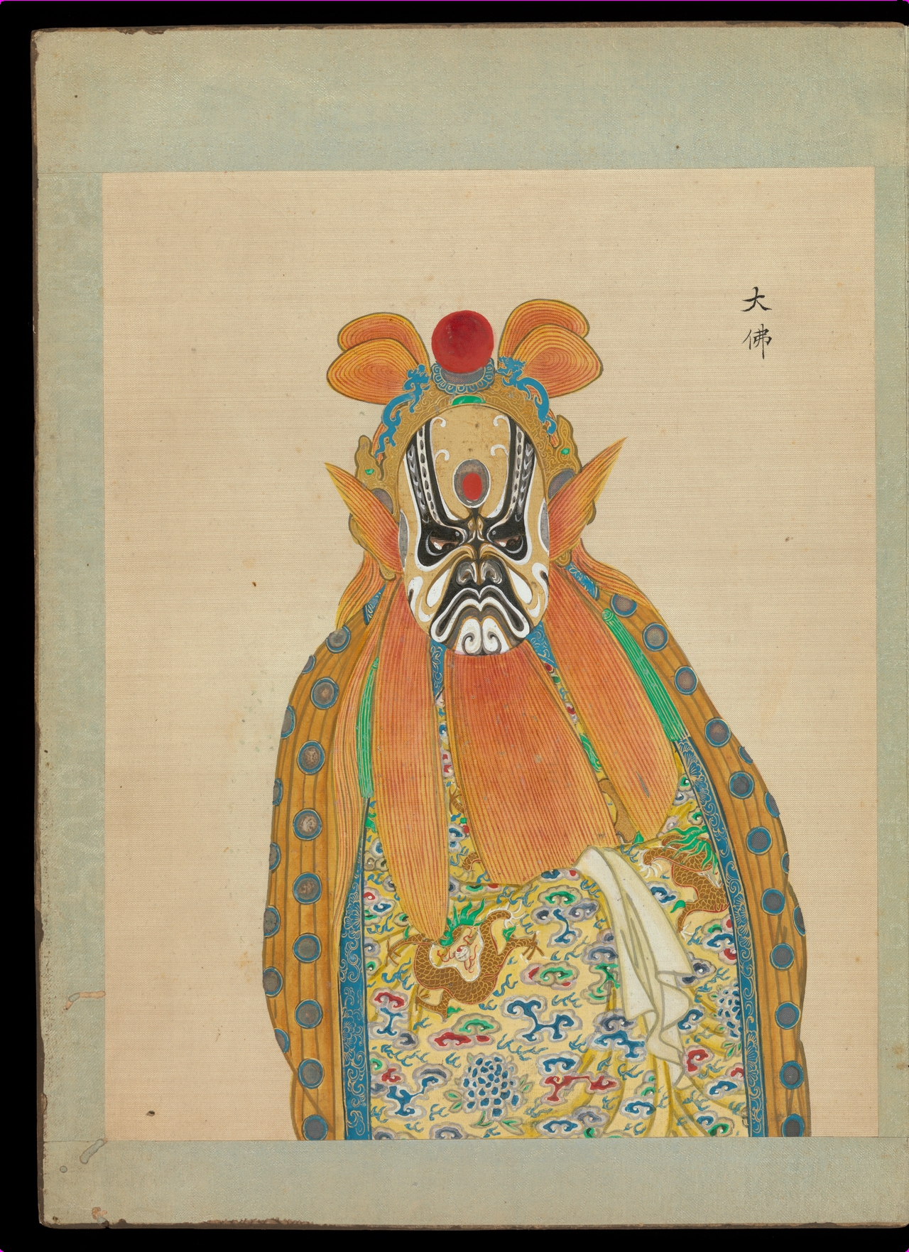 China; Album; Paintings